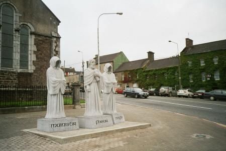 Fhear, Mainistir und Maigh in Fermoy